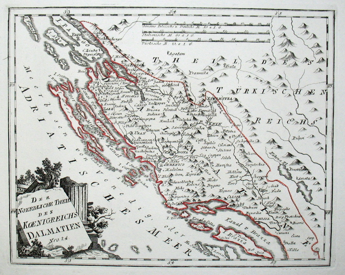 Der Noerdliche Theil des Koenigreichs Dalmatien. Nro. 24. Kolorierter Kupferstich